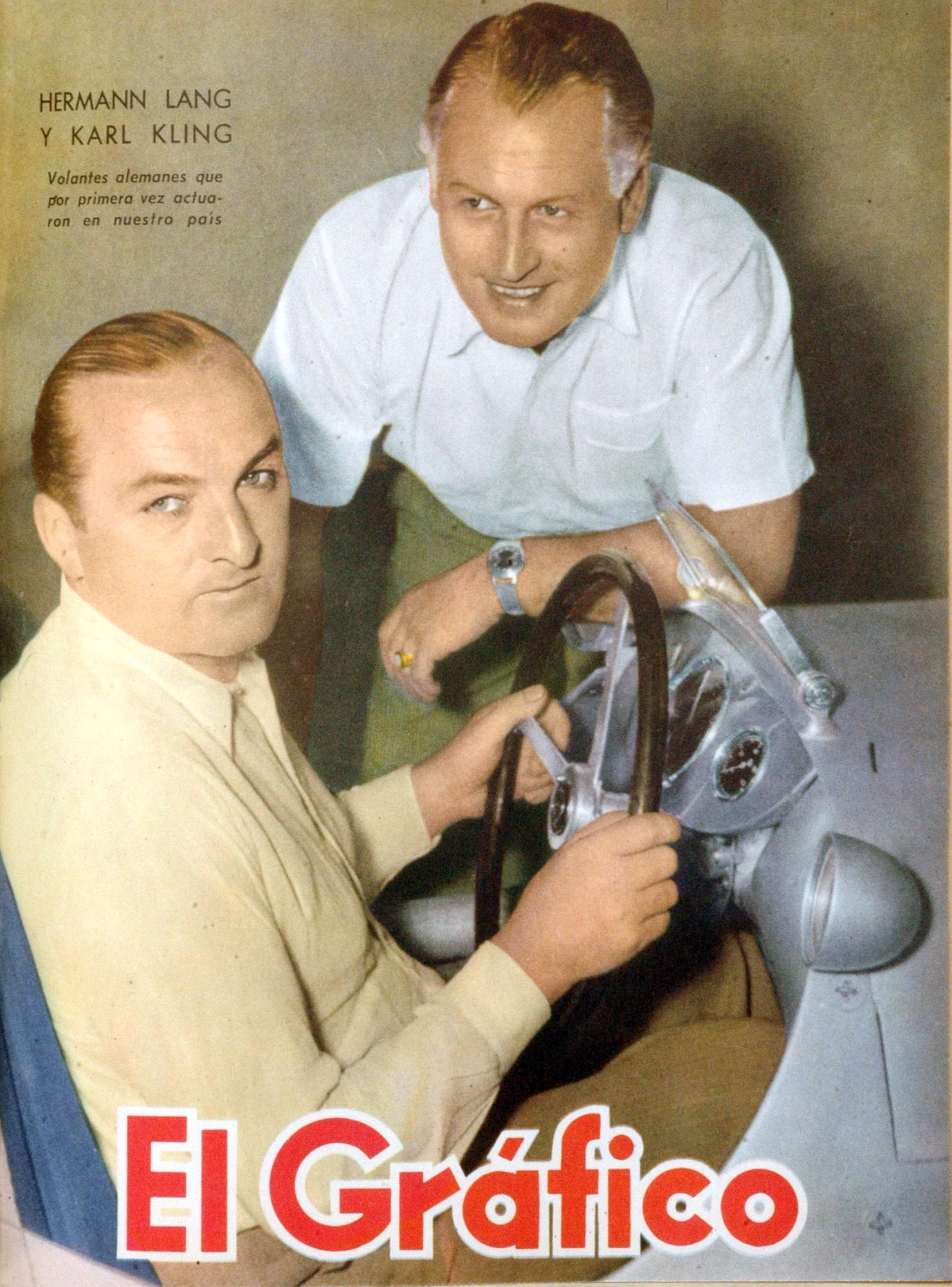 El Grafico del 16 de Marzo de 1951. Edicion 1649